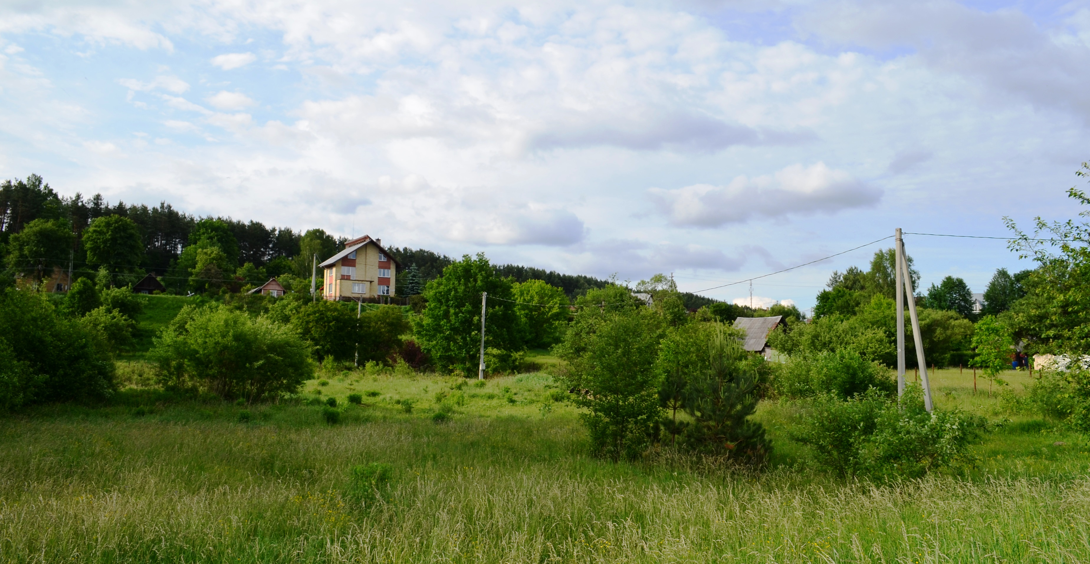 Ožkiniai, Vilnius